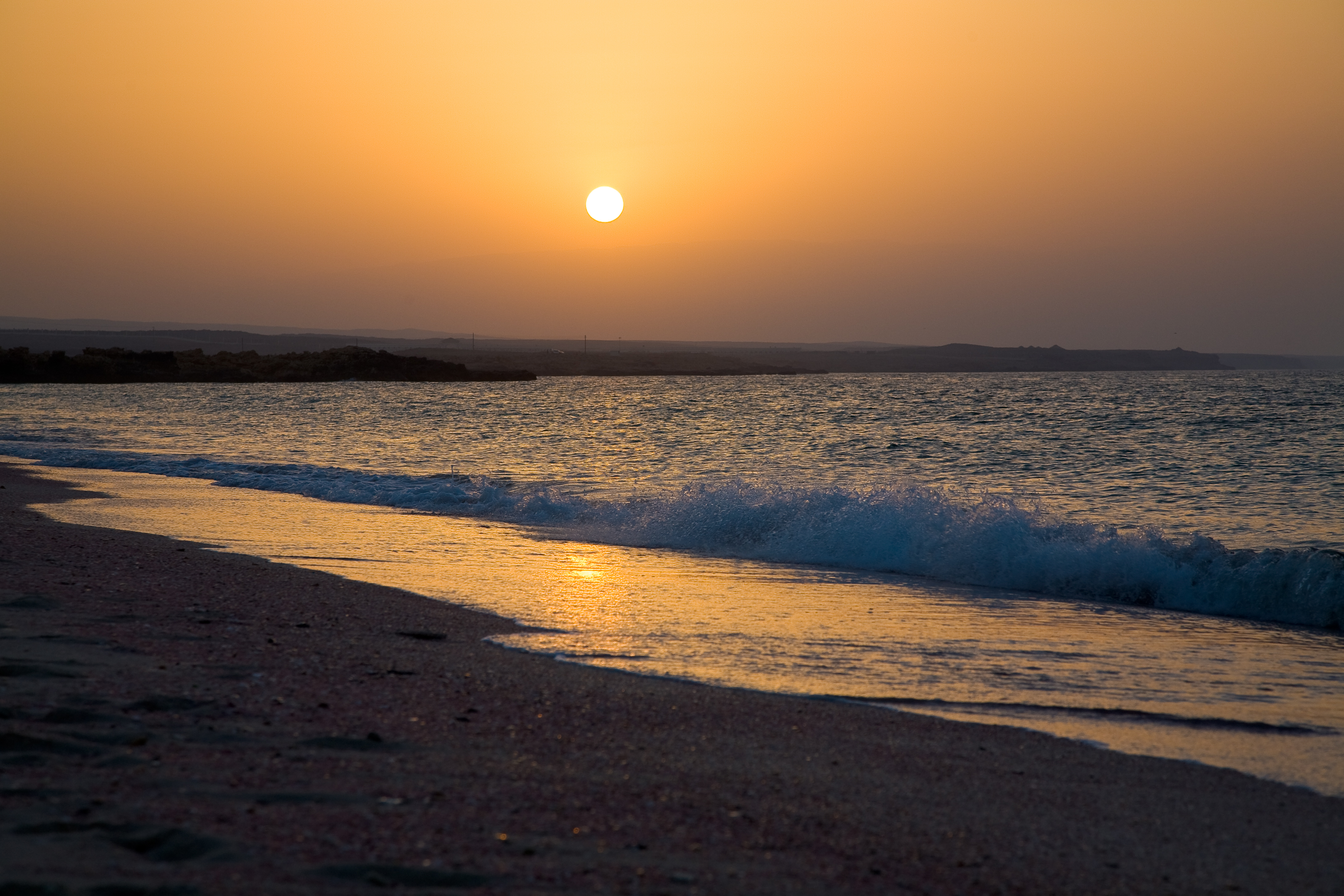 Sunset at Ras al Hadd, Oman